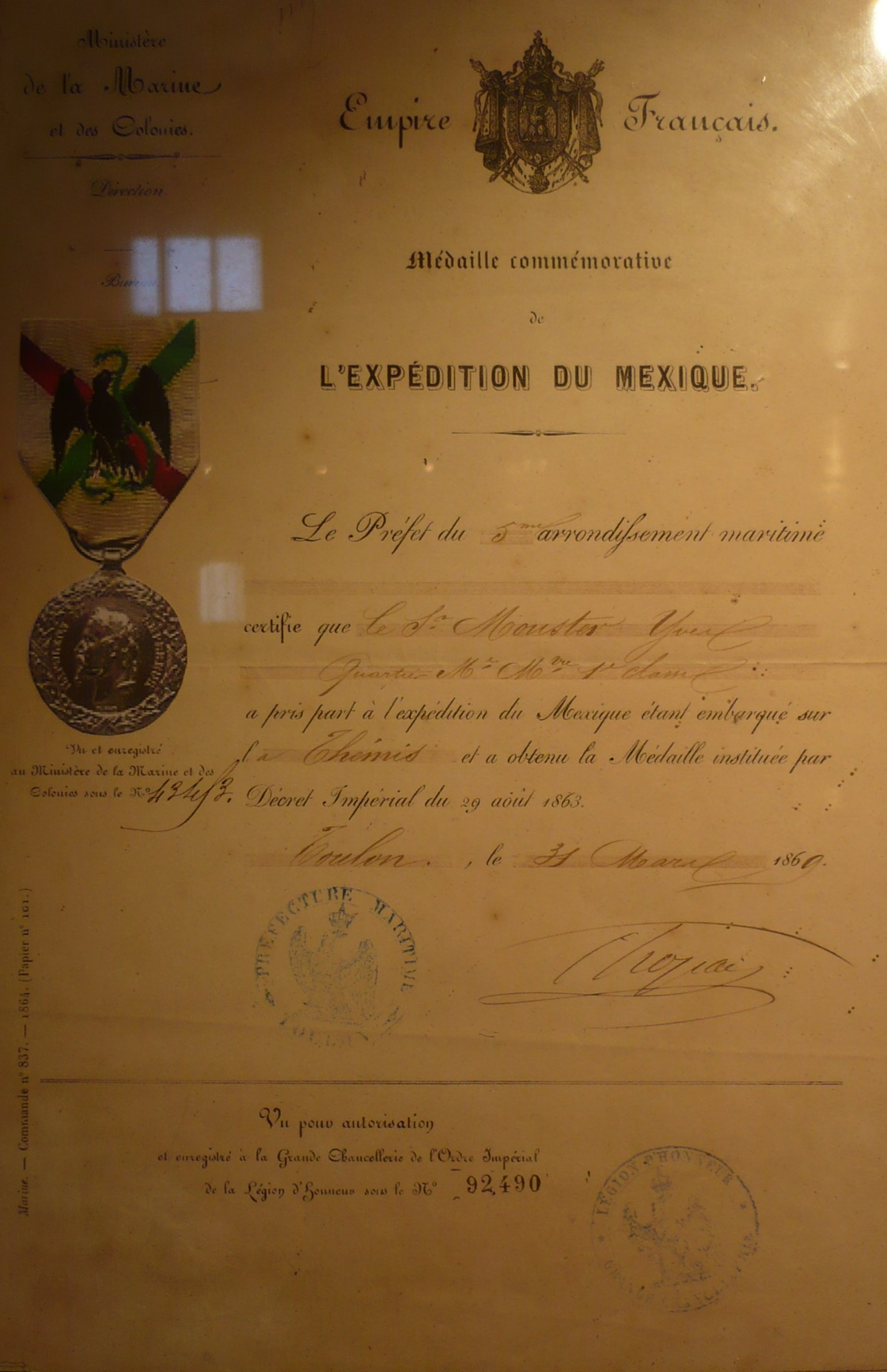 Diplôme d'attribution de la Médaille commémorative de l'expédition du Mexique